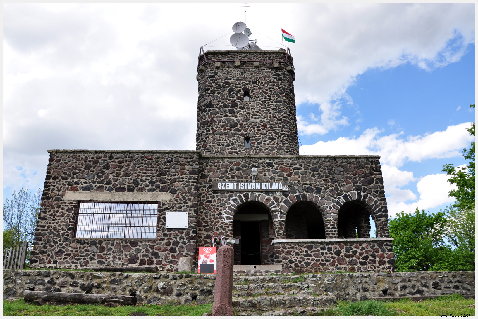 Somló, Doba, Szent István Kilátó Medgyasszay István tervezte. 12 m magas torony. 1938 május elején kezdődött az építése, Fa László építészmérnök vezetésével.[1]